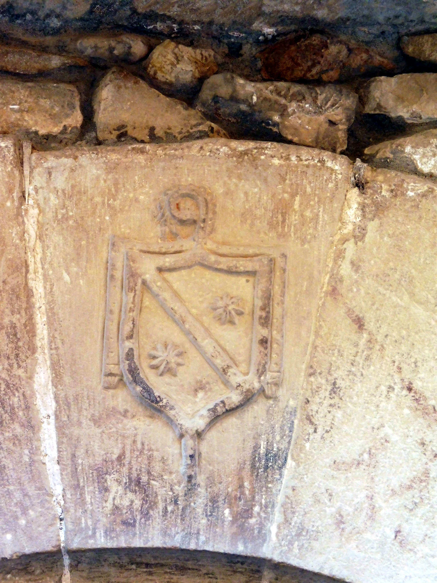 Cal Berguedà (Vallbona de les Monges): clau de la portada